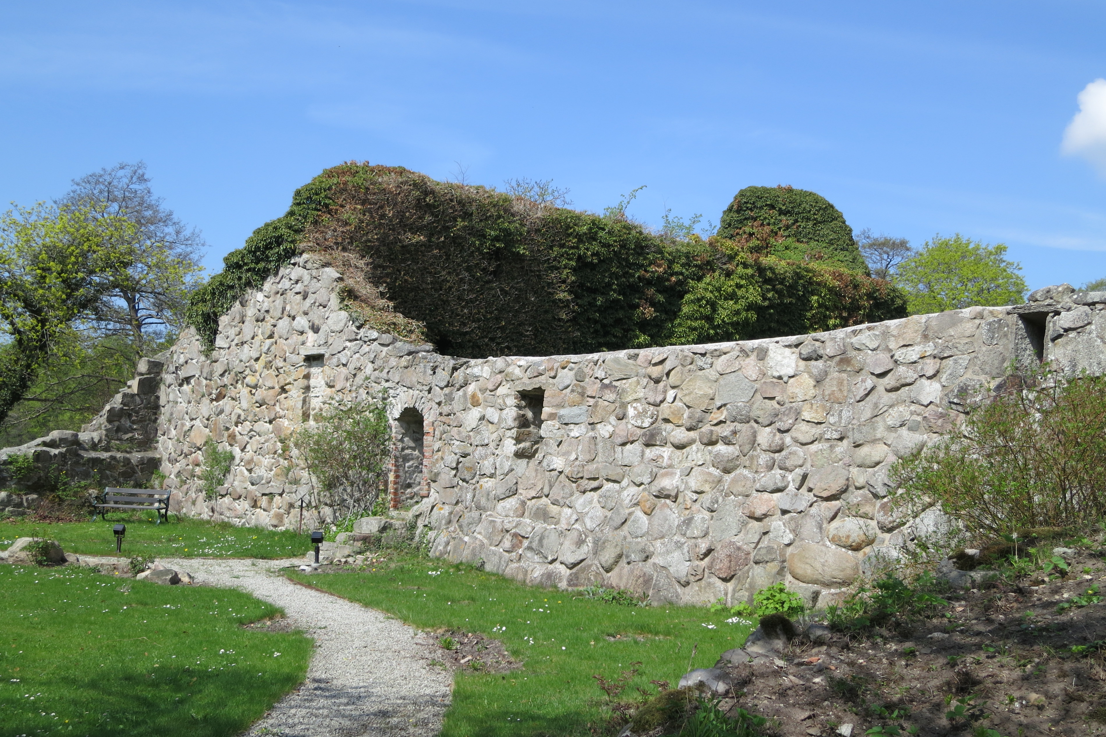 Gyllebo borgruin i Skåne, borgruinen